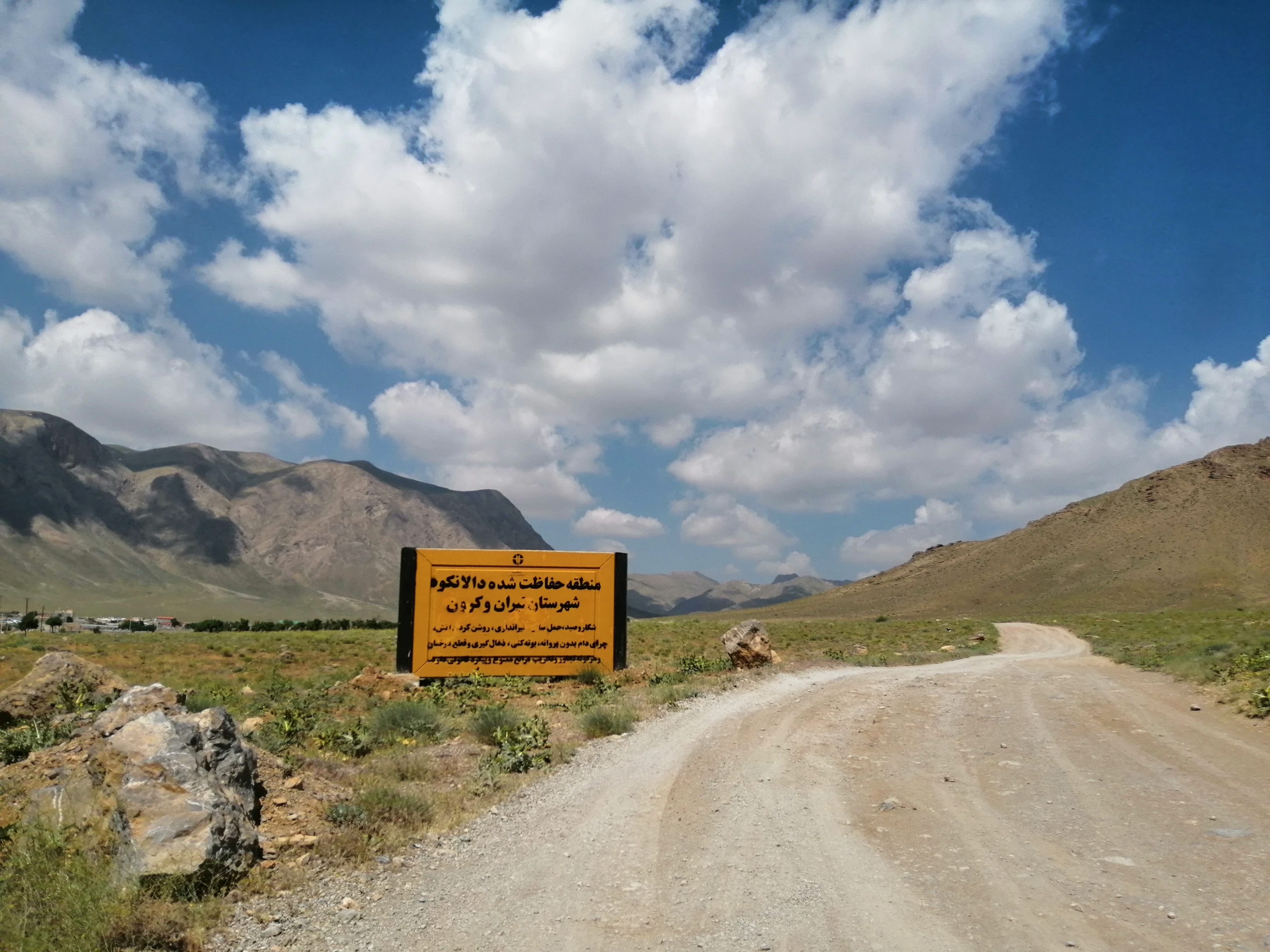 منطقه حفاظت شده دالانکوه واقع در بخش کرون ، شهرستان فریدن و شهرستان چادگان